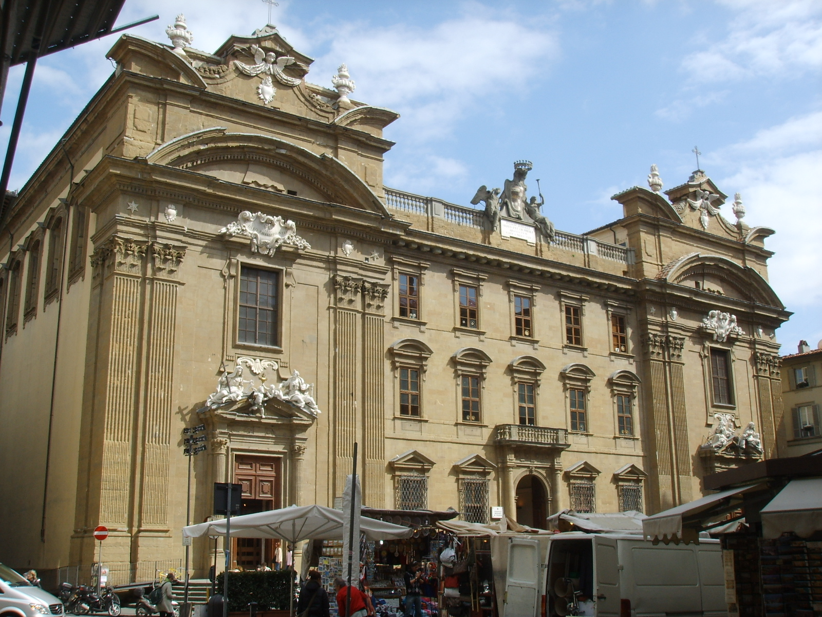 Complesso di san firenze